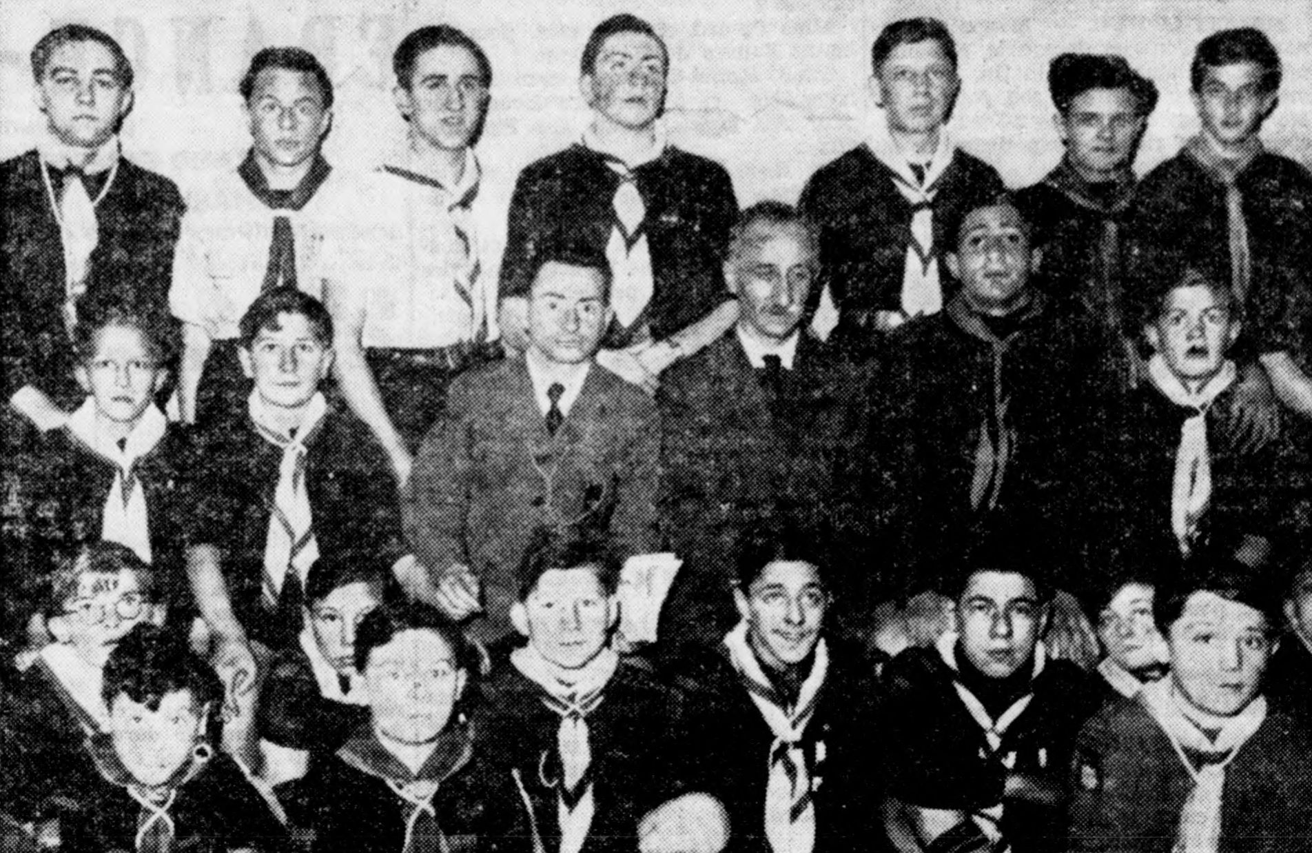 La photo en noir et blanc montre une vingtaine de scouts de Dijon, membres des Éclaireurs de France, entourant leur chef local, à gauche et à droite leur commissaire national André Lefèvre. À part ces deux derniers, en costume cravate, tous portent l'uniforme scout. Ils sont âgés environ de 8 à 16 ans.